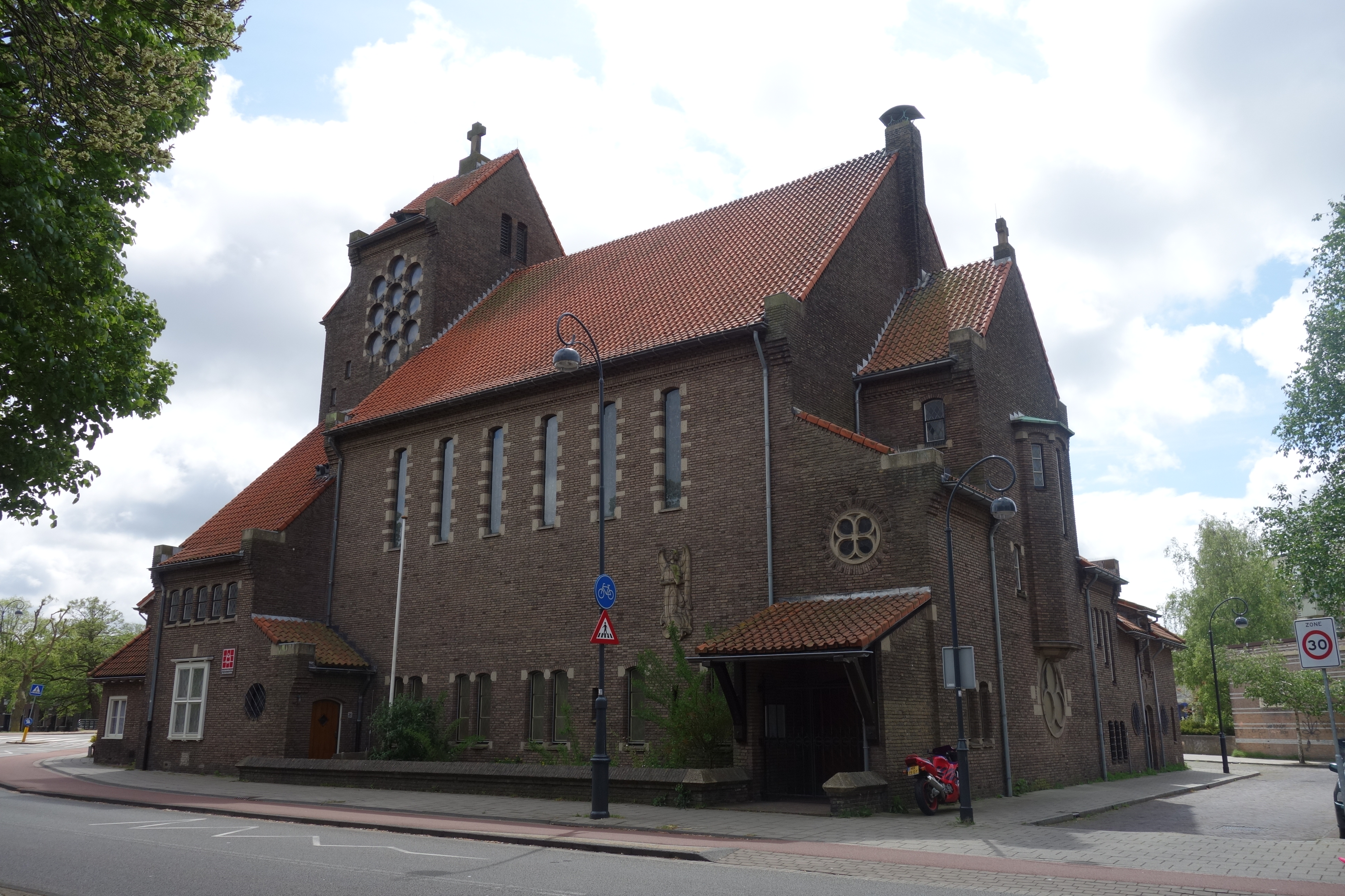 De Oud-Katholieke Kerk St Anna en Maria aan de Kinderhuissingel 76. De kerk is een gemeentelijk monument.